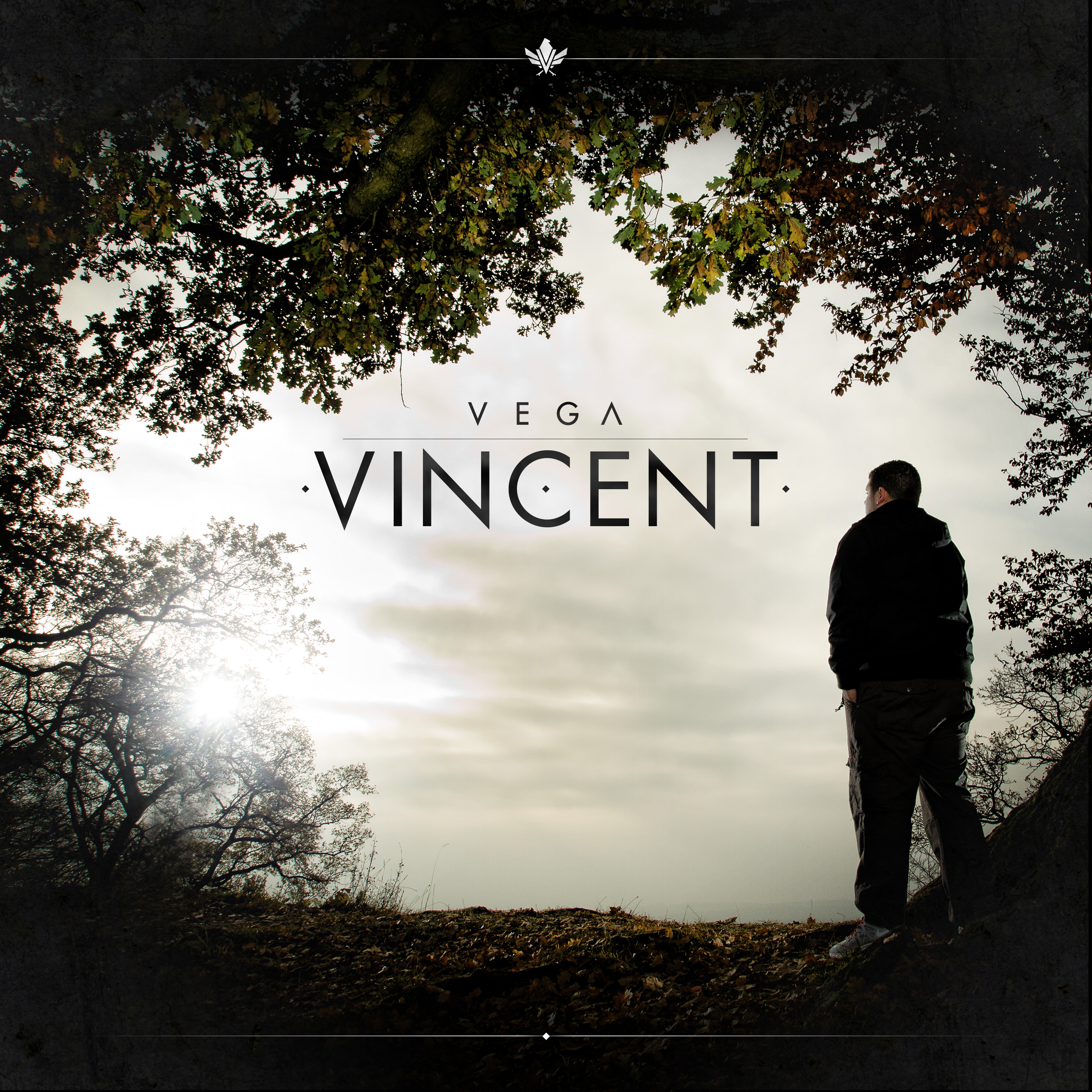 Cover des Albums „Vincent“